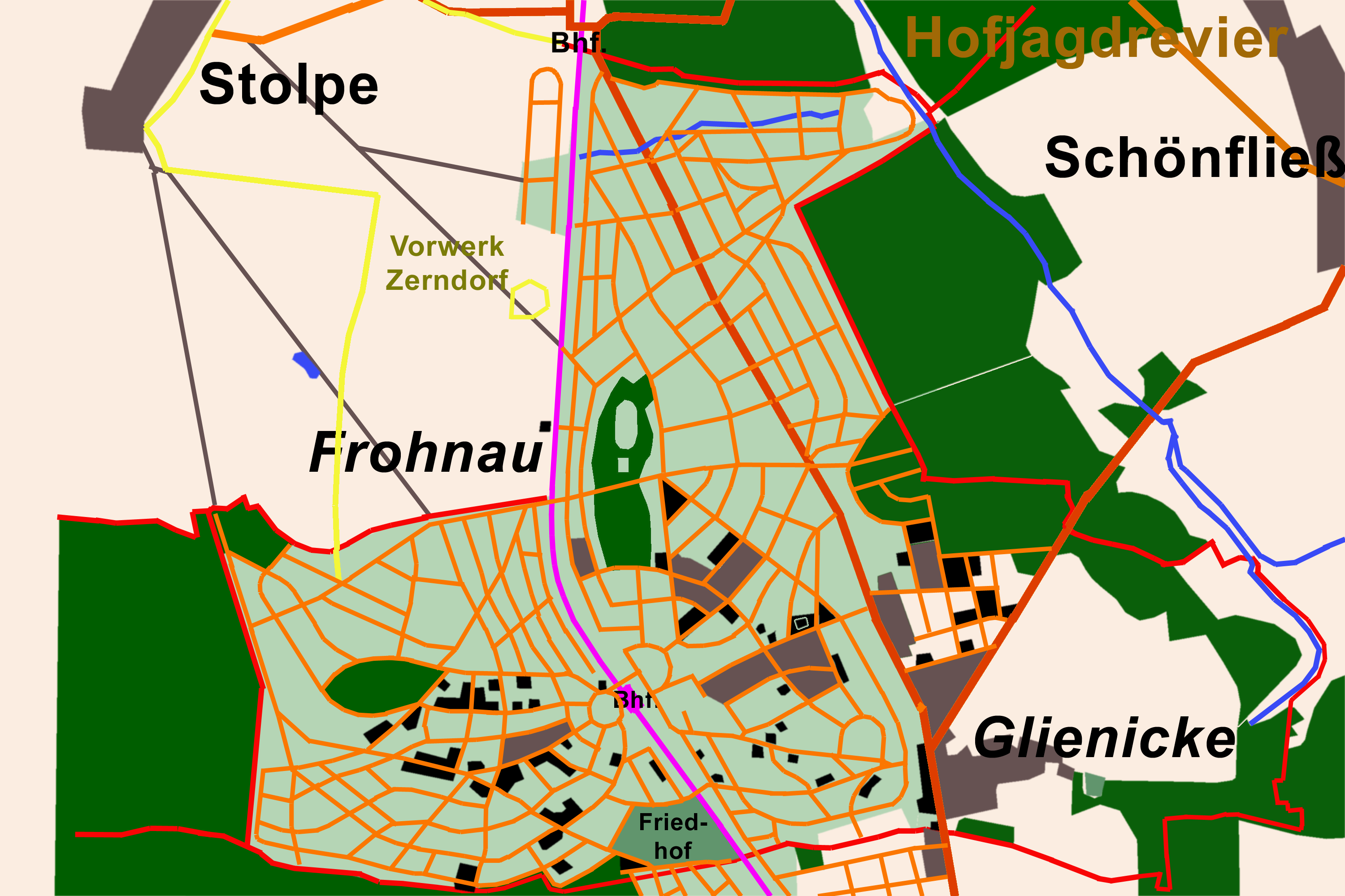 Die Planung der Siedlung Frohnau etwa aus dem Jahre 2008. Grün hinterlegt auf dem Ortsfläche Wald und Wald-Grundstücke. Die Karte wurde auf Grundlage des Digitalisat von: Kiessling's grosse Special-Karte der Umgegend von Berlin. – 1:75.000. – Berlin : Kiessling. – 1 Kt.: mehrfarb. – ohne Auflagenbezeichnung nach [1] erstellt.